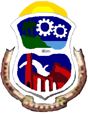 Escudo del municipio Diego Ibarra, estado Carabobo, Venezuela